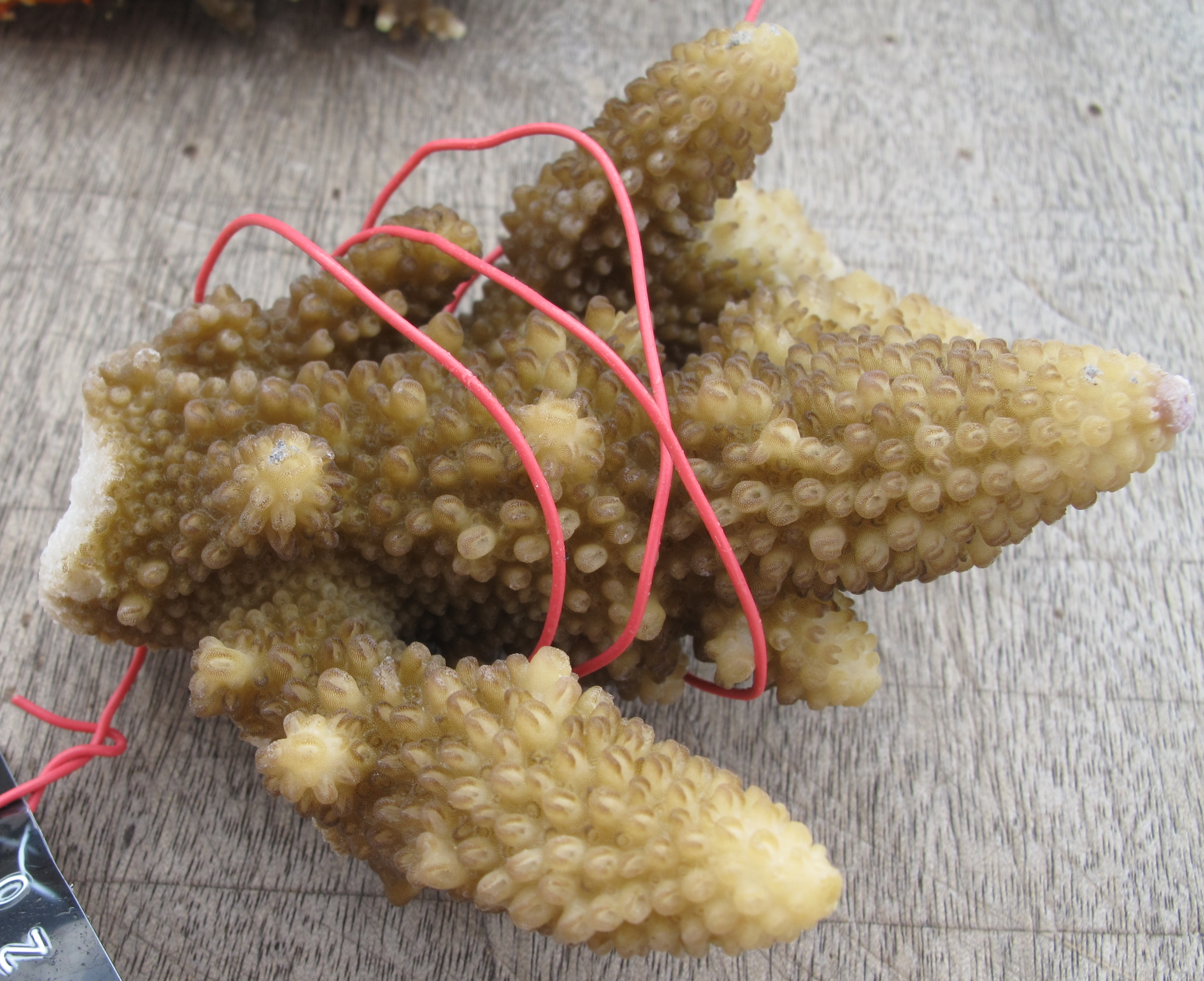 Porción de Acropora gemmifera, isla Mer. Monitoreo de la salud de los arrecifes del Estrecho de Torres, AIMS: Instituto Australiano de Ciencia Marina.